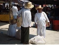 Idioma náhuatl en San Isidro